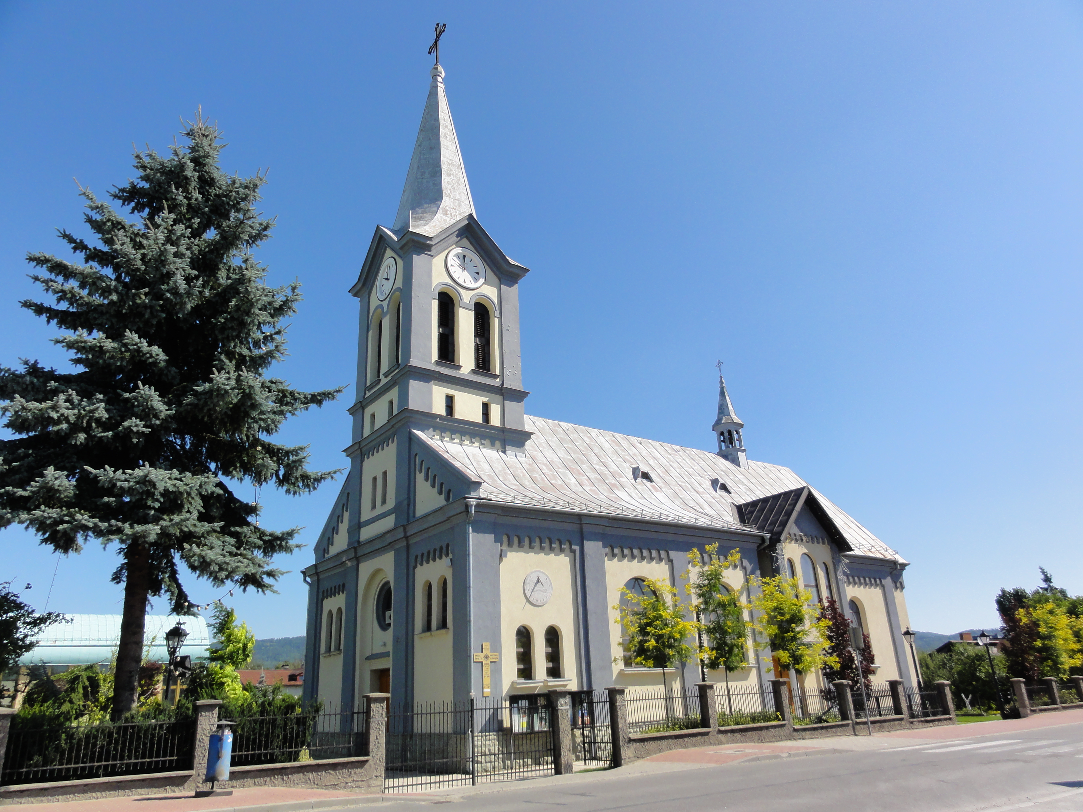 Kościół Matki Bożej Pocieszenia w Rybarzowicach